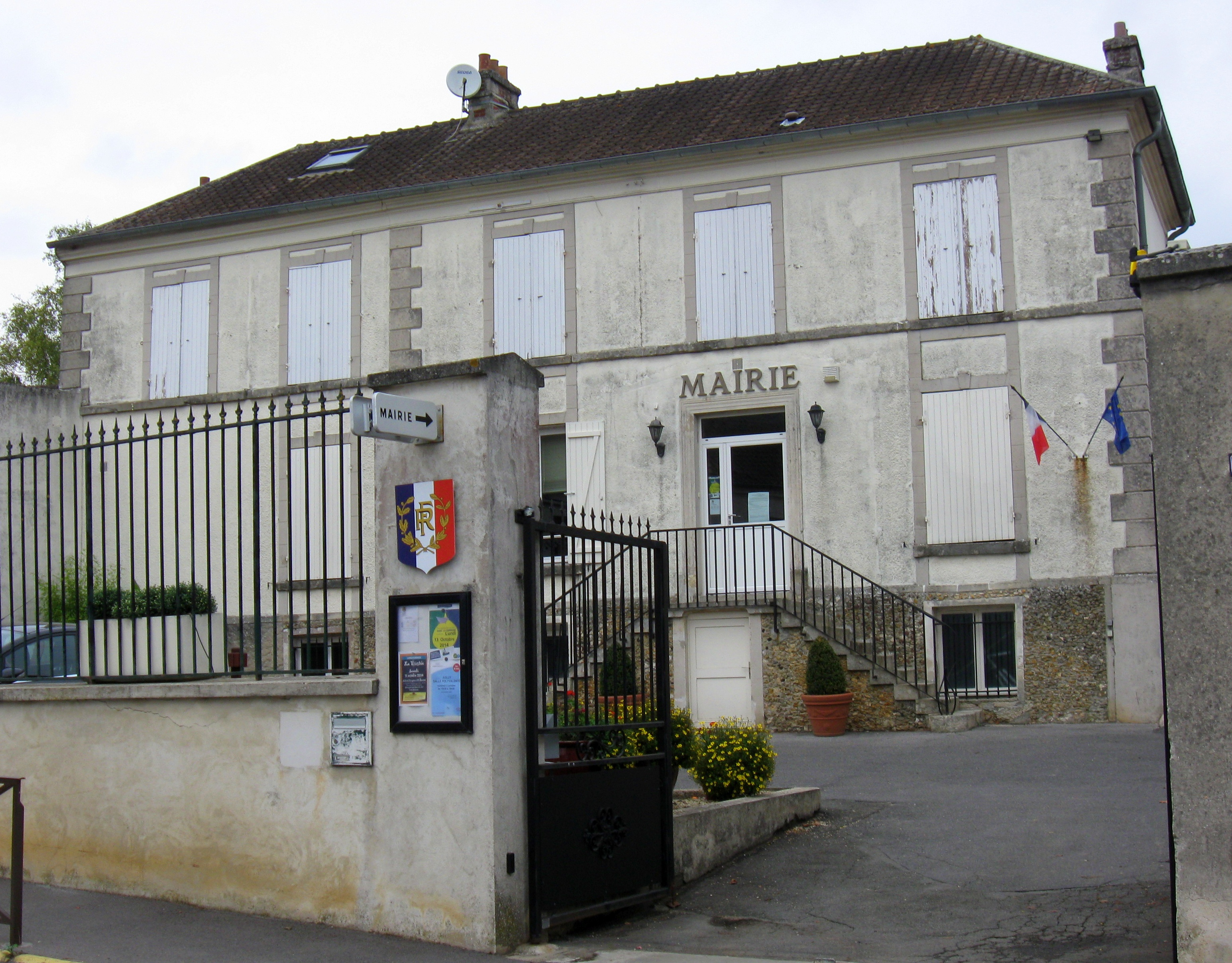 Mairie de Nantouillet. (Seine-et-Marne, région Île-de-France).